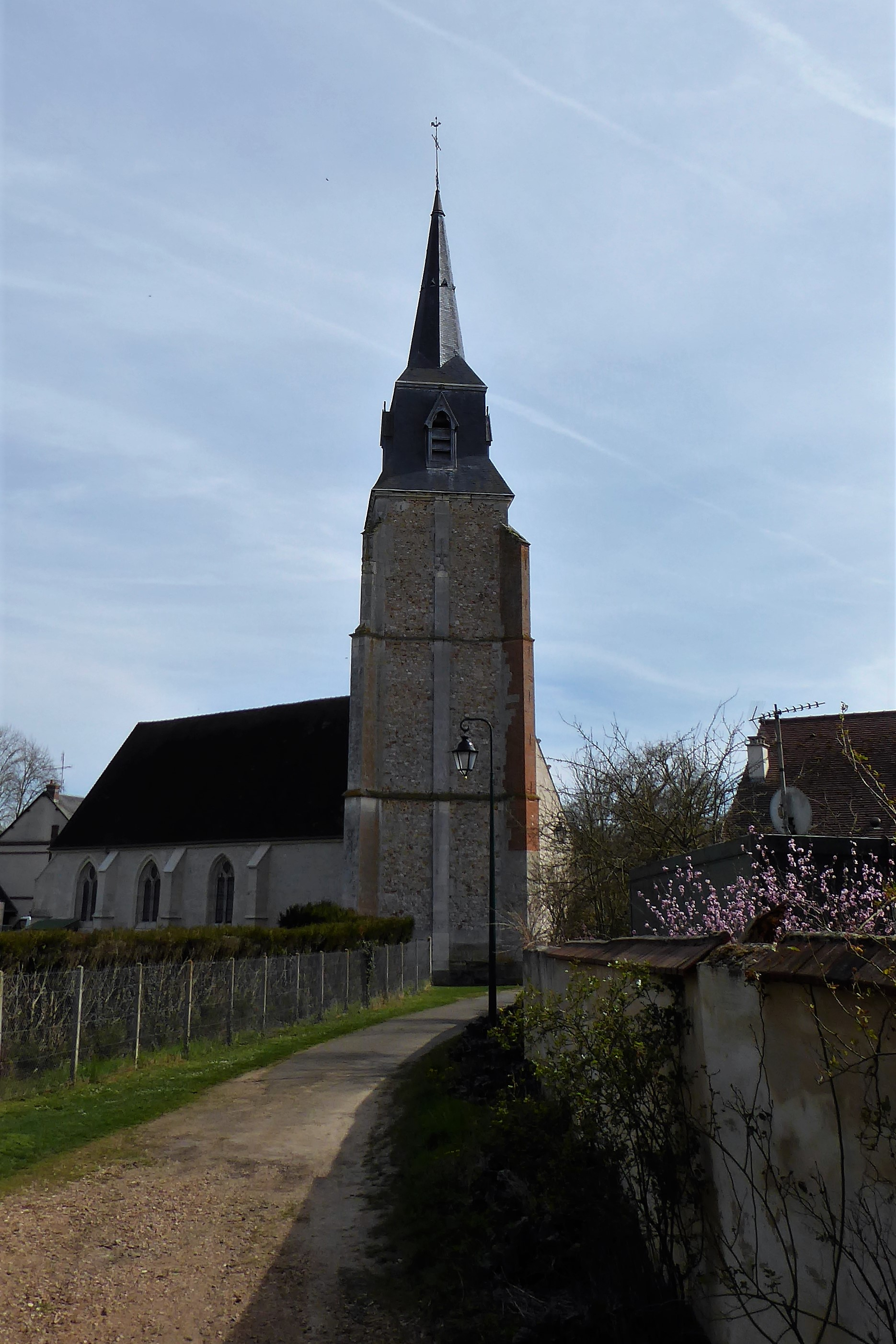 église Saint-Pierre, Vert-en-Drouais, Eure-et-Loir, France.